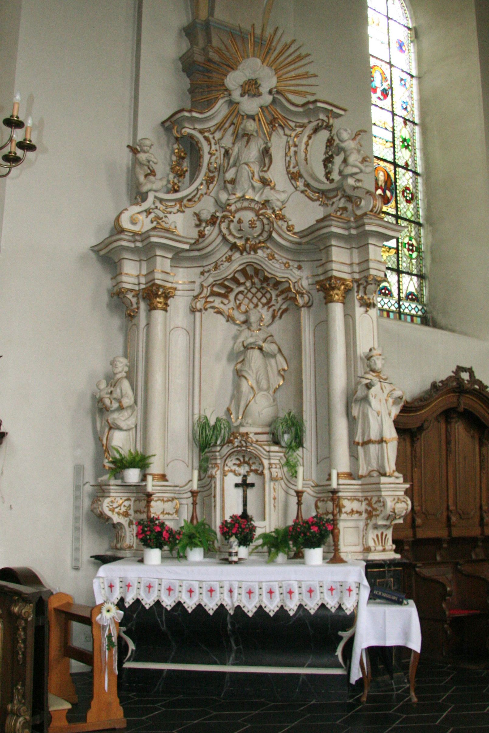 Linker Seitenaltar der Nikolaikirche in Brilon